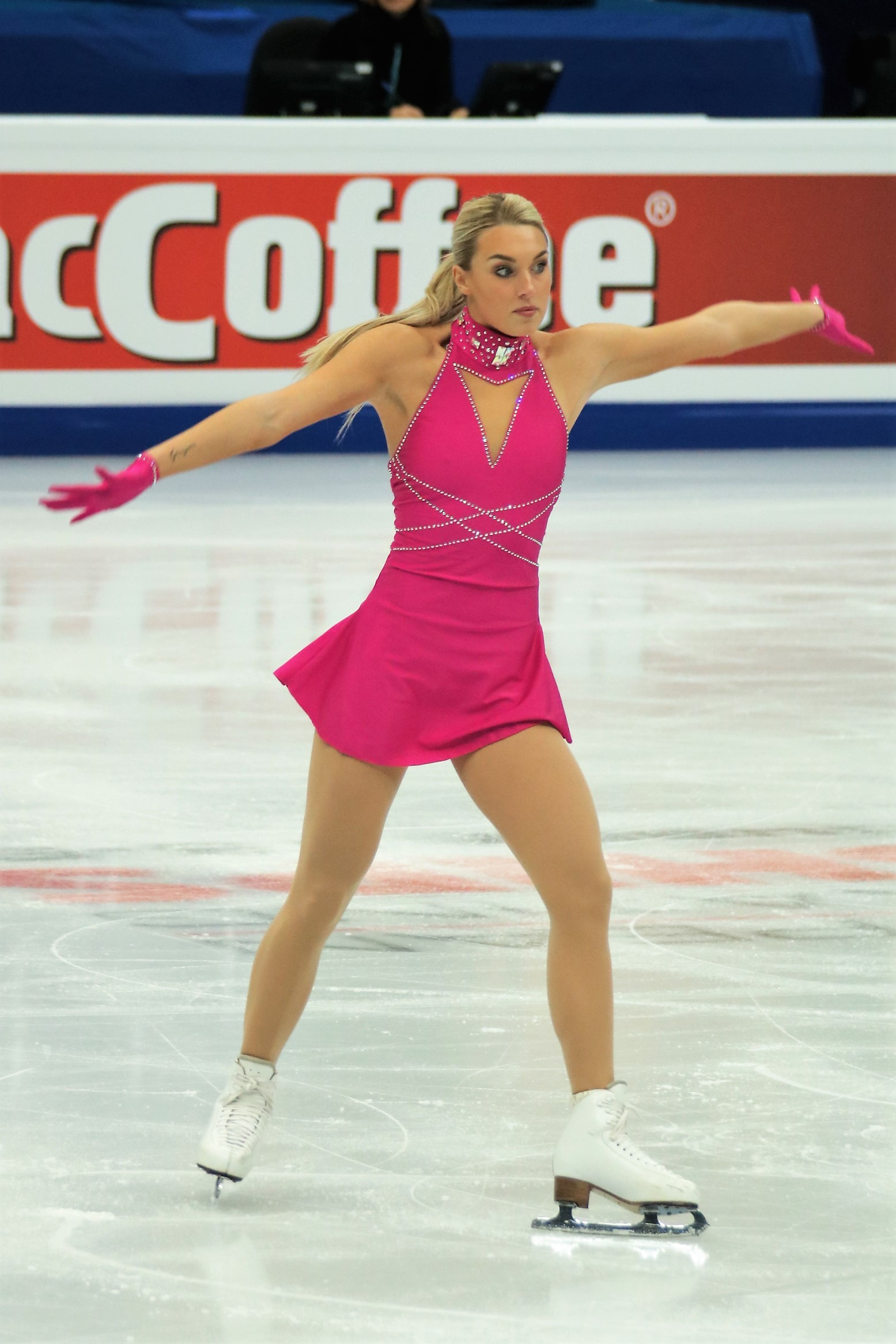 Пернилл Соренсен (Дания) на Чемпионате Европы по фигурному катанию 2018.